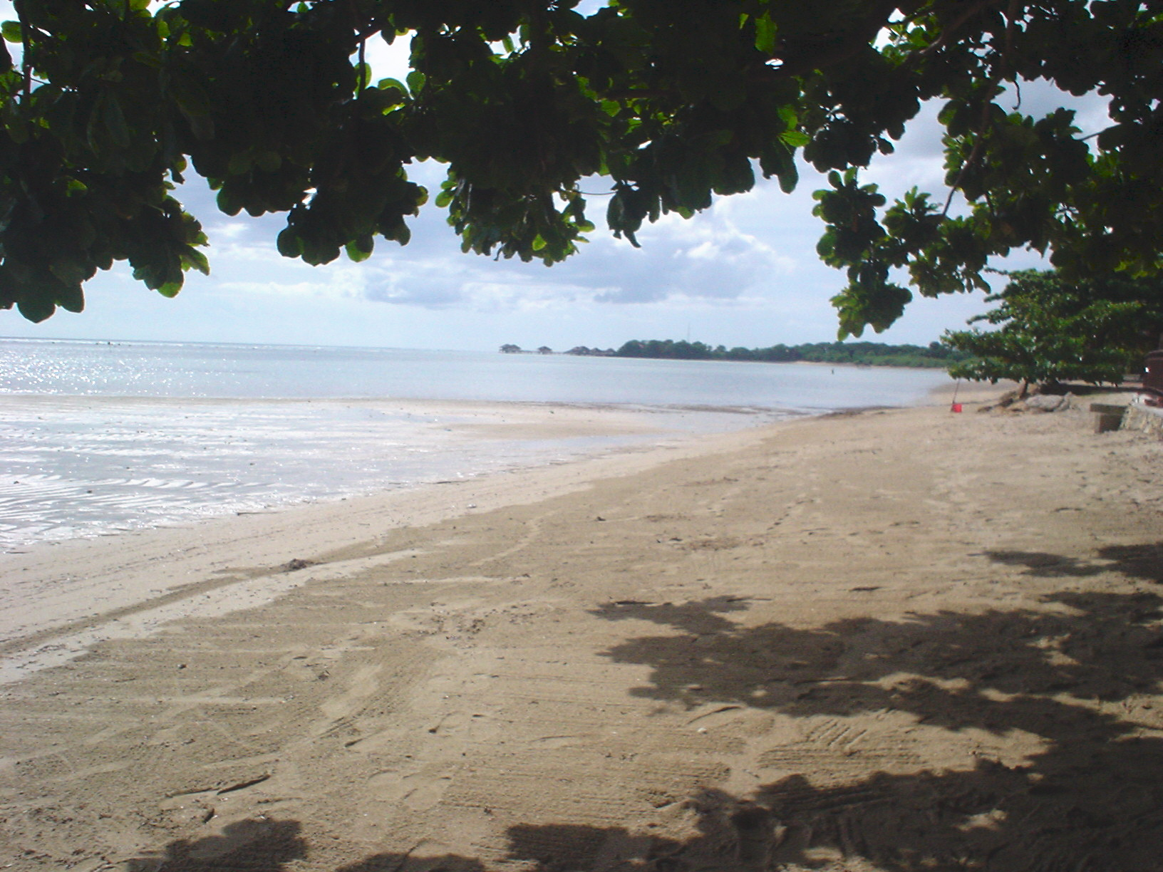 Calatagan, Batangas, Philippines